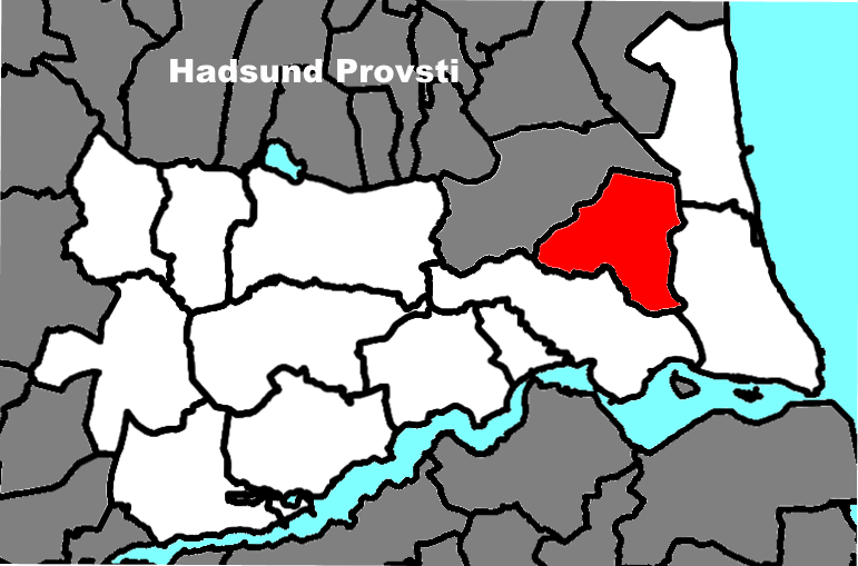 Sognets beliggenhed i Hadsund Provsti.